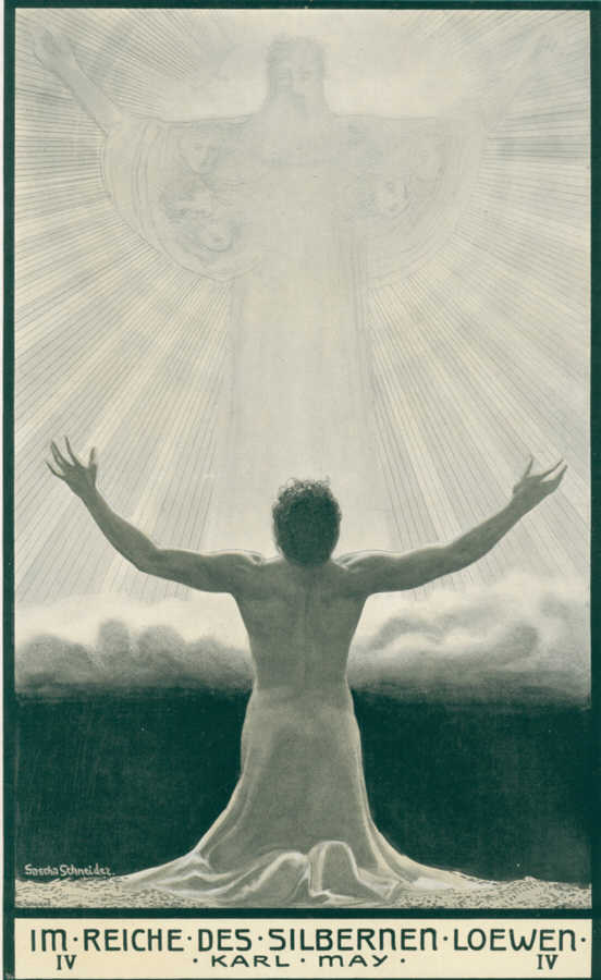 Deckelbild zu Karl Mays Reiseerzählung Im Reiche des silbernen Löwen IV (Sascha-Schneider-Ausgabe)